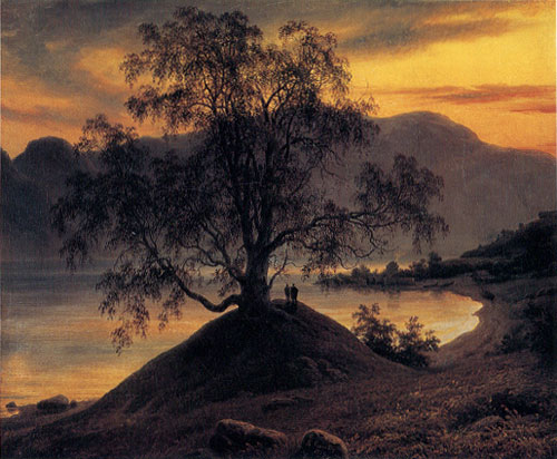 Querträger Birken (1839) gilt als das Hauptwerk Fearnleys